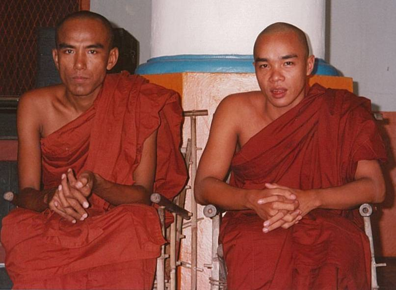 Boeddhistische Monniken in Rangoon, Birma (Myanmar). Foto door Peter Prevos (1994)